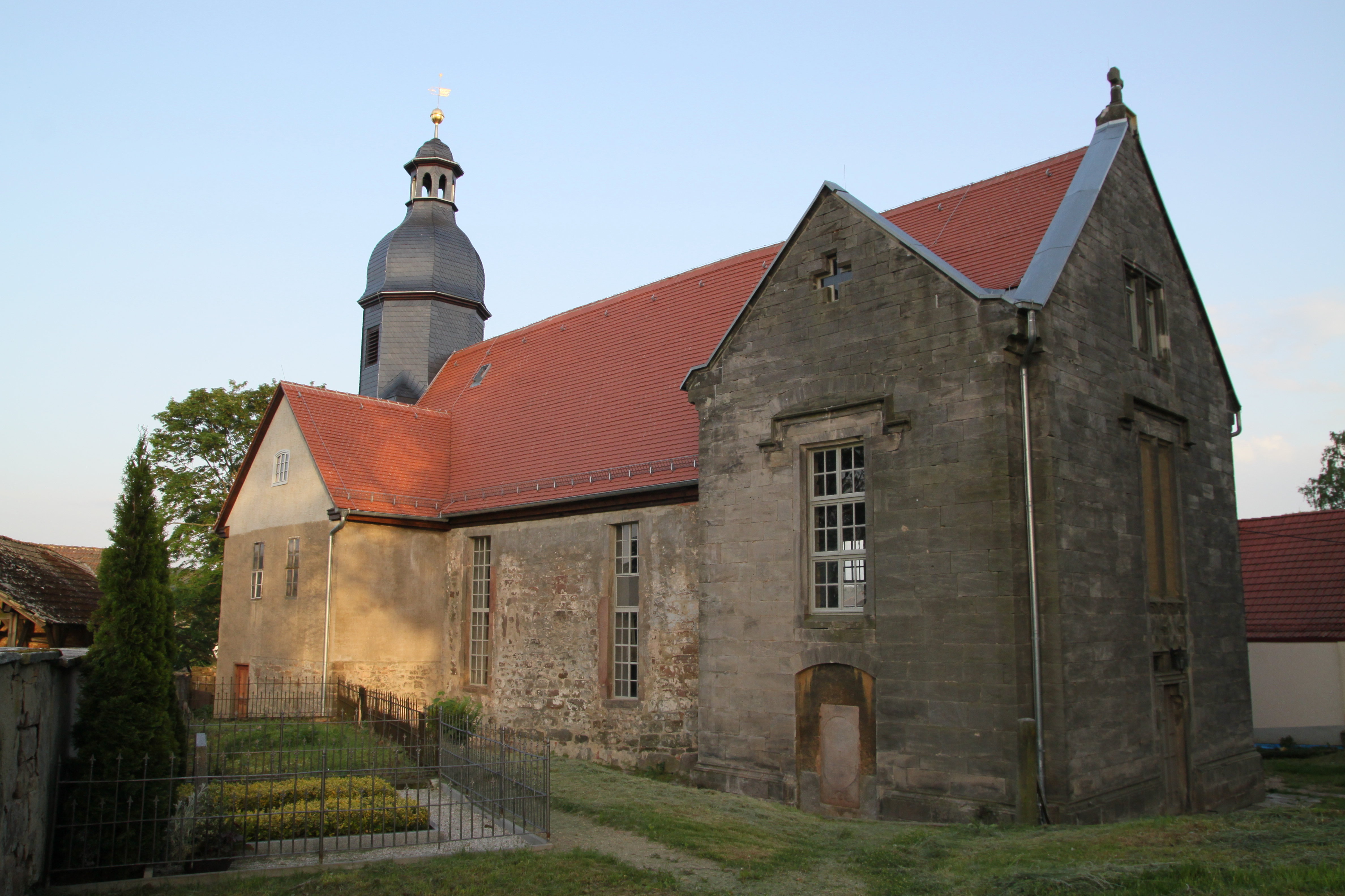 Dorfkirche Serba - 2014